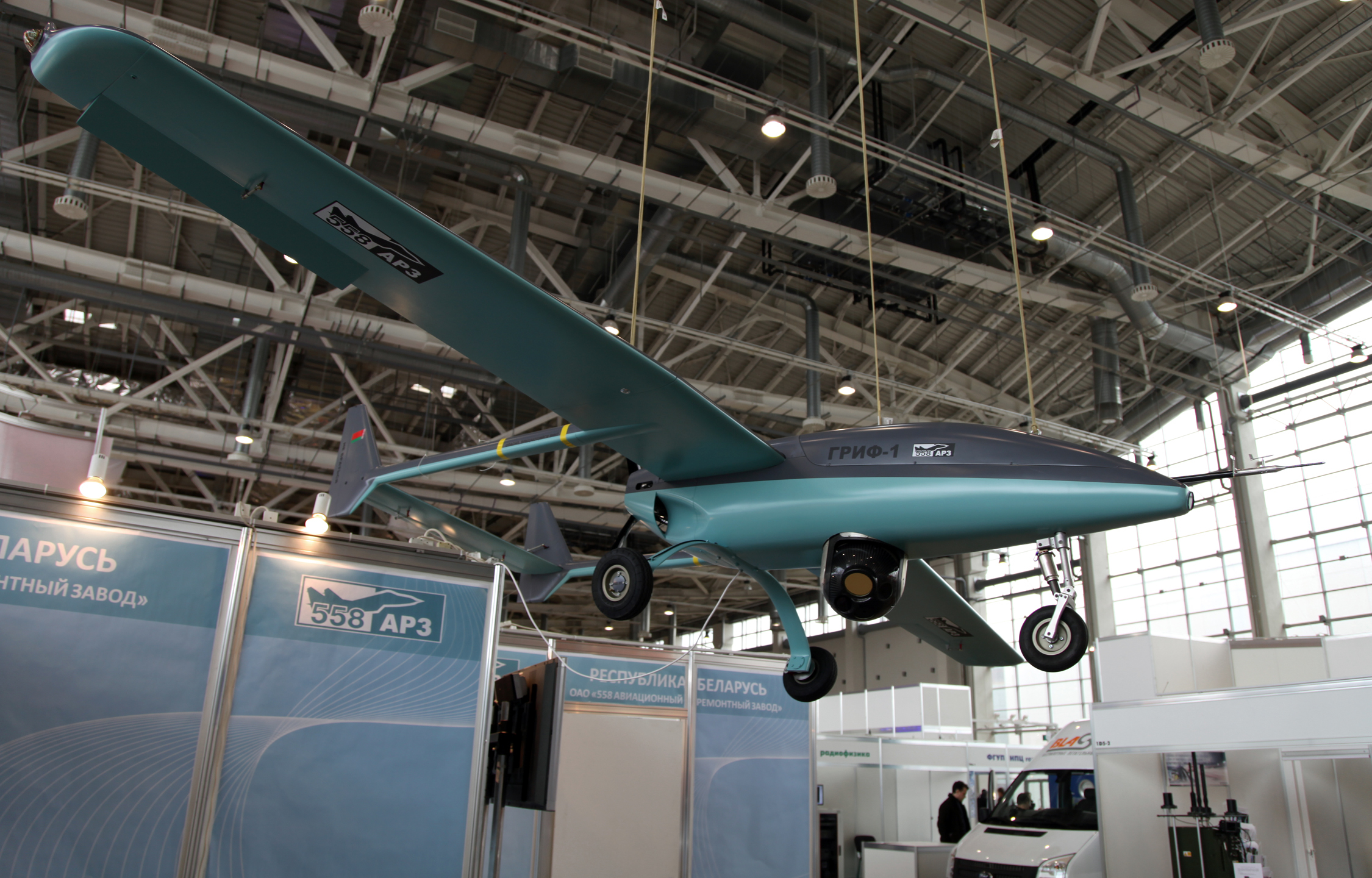 БПЛА Гриф-1 (Belorussian Grif-1 UAV)